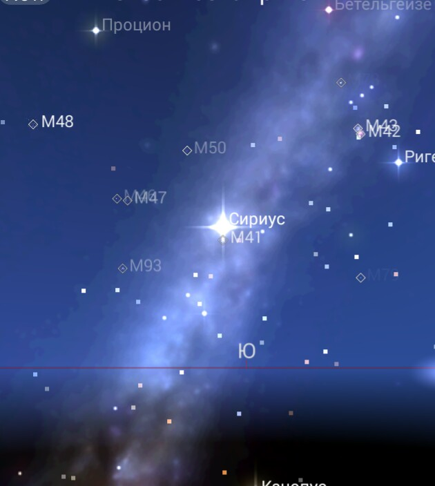 Процион, Бетельгейзе, Сириус, Факт и Наос - звезды астеризма Египетский крест. Сделано в приложении StarChart